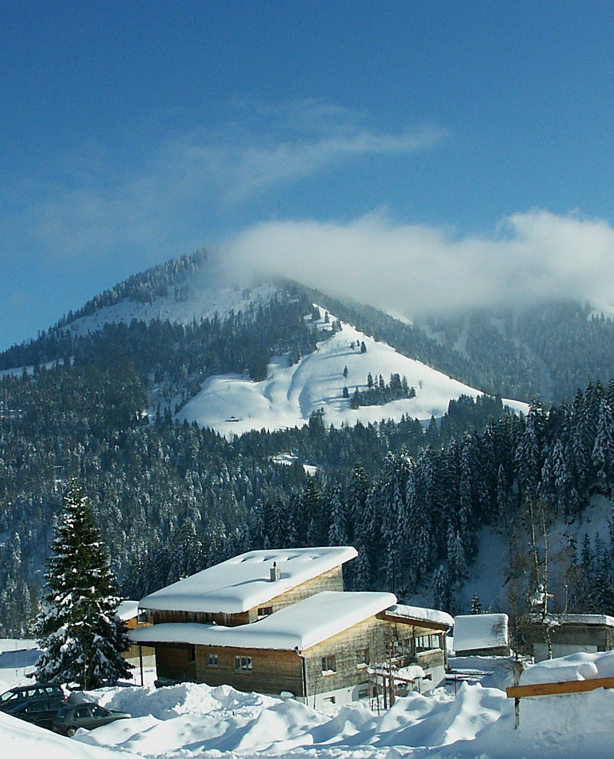 Sportheim Ebnit, Dornbirn mit Blick auf die Ilgenwald Alpe im Winter